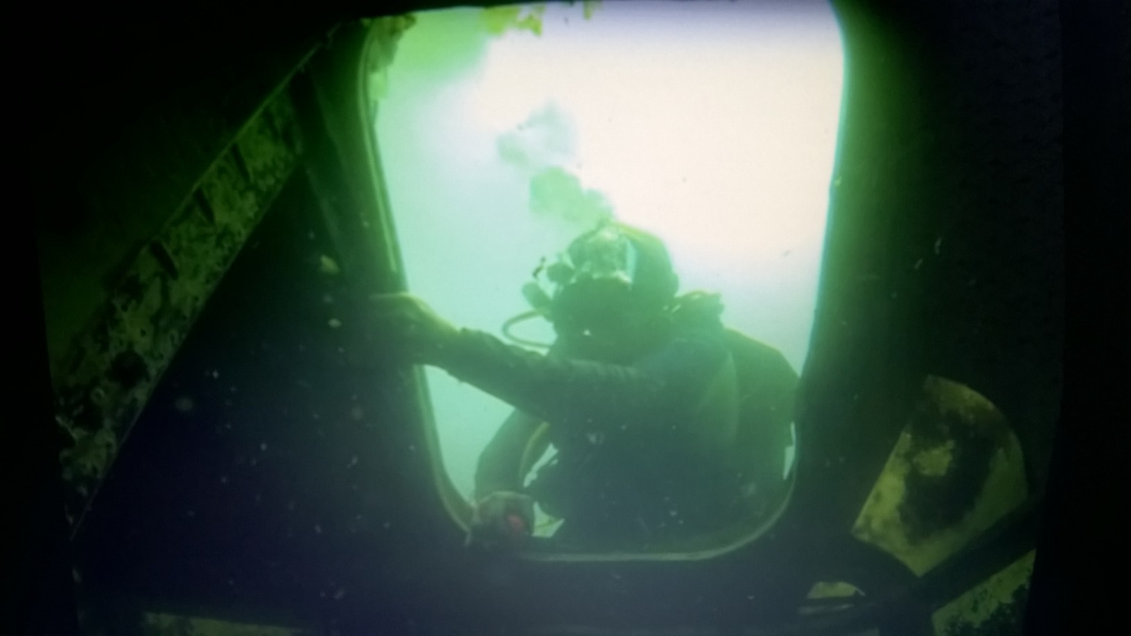 Policijski potapljač išče in odkriva dokaze. / en: Police diver search for and detect evidence